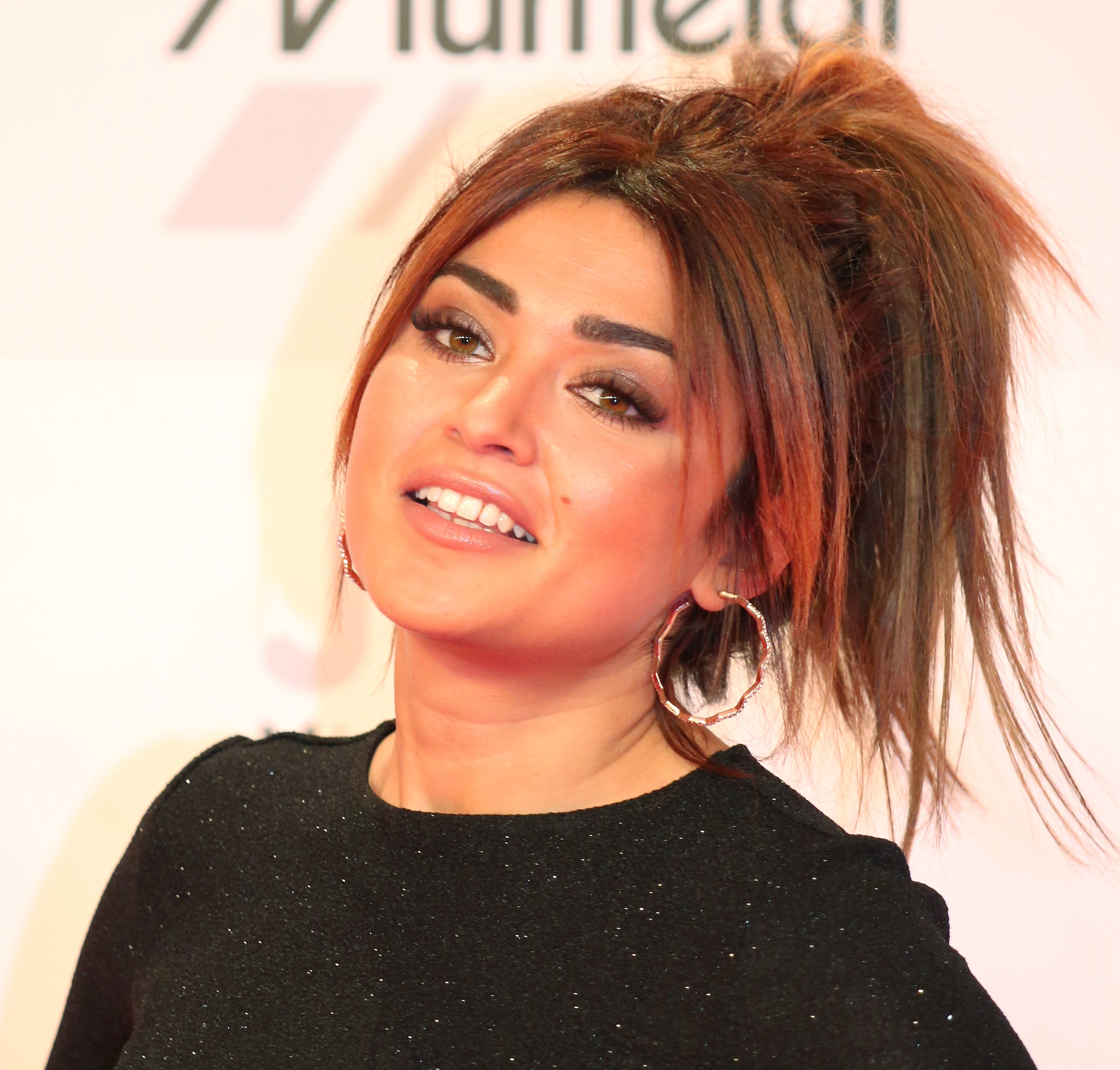 Maria Voskania bei der Kinderlachen-Gala 2017, in Dortmund.